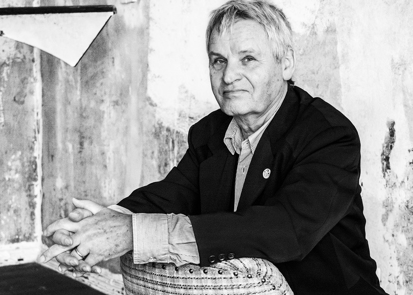 Filmemacher und Kameramann Gerd Conradt, Aufnahme aus dem Jahr 2012. Foto: Thomas Klingberg